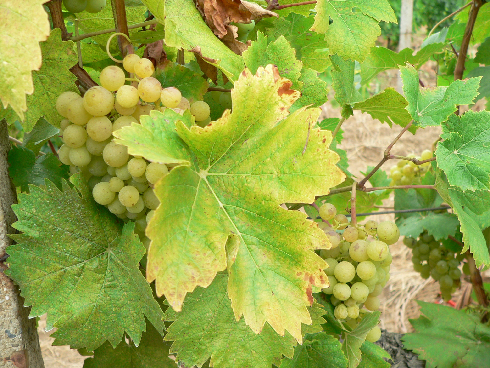 Soi de struguri